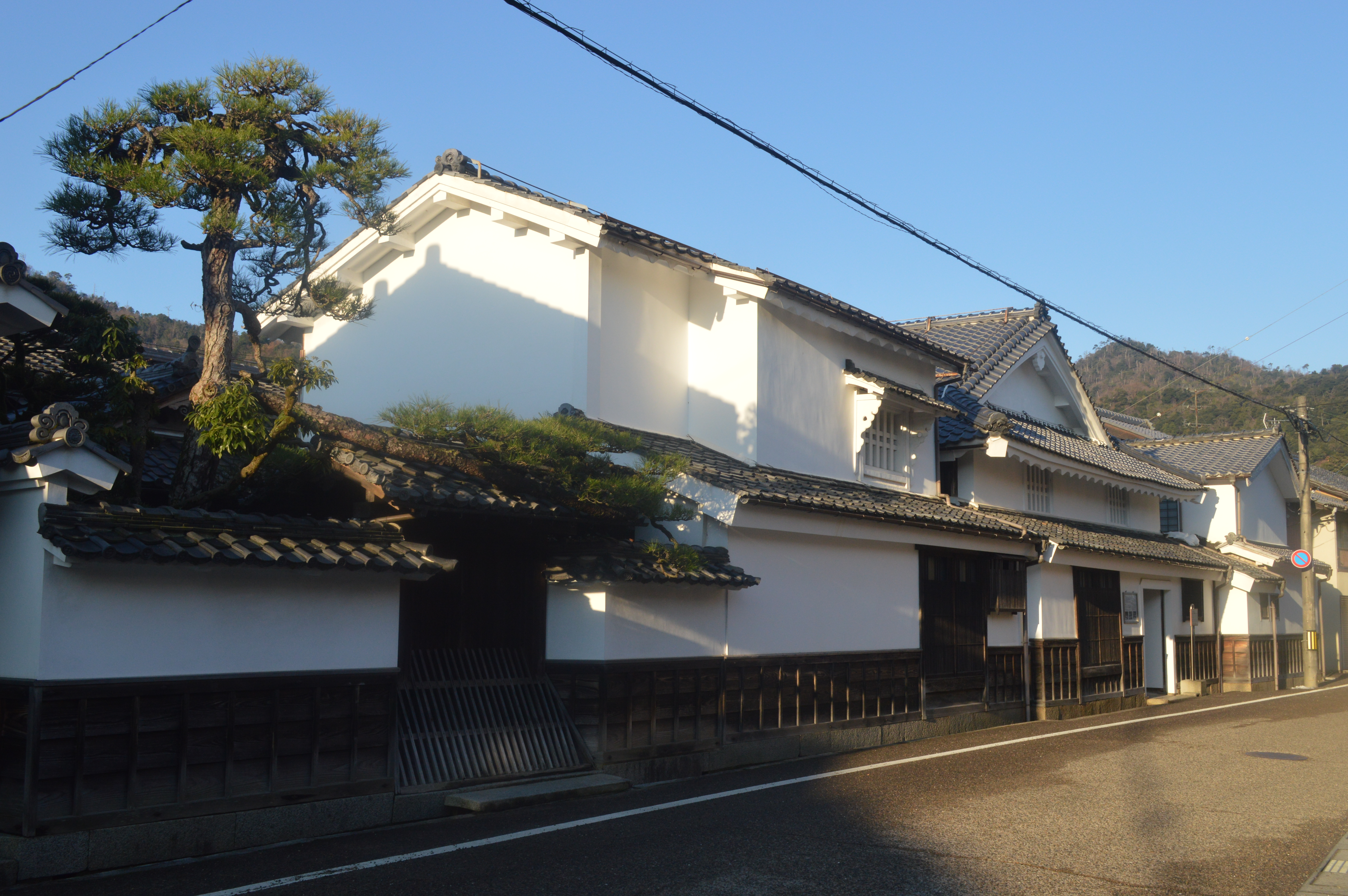 京都府宮津市にある旧三上家住宅。国の重要文化財に指定されている。